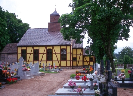 Kaszëbsczi: Wiązarkòwi kòscół w Tëłowie, w pùcczim krézu.